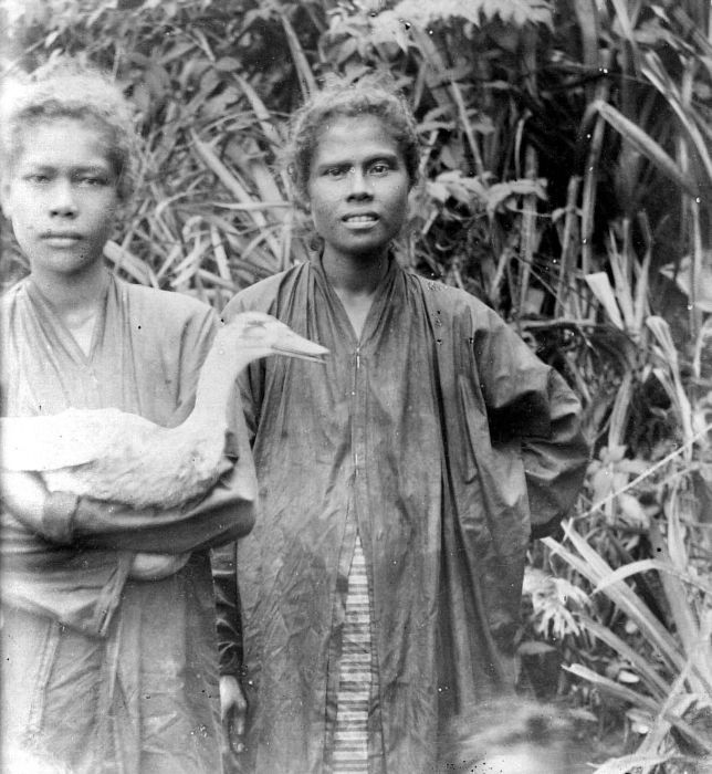 Repronegatief. Portret van twee vrouwen uit Amboina